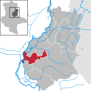 Möser im Landkreis Jerichower Land, Sachsen-Anhalt